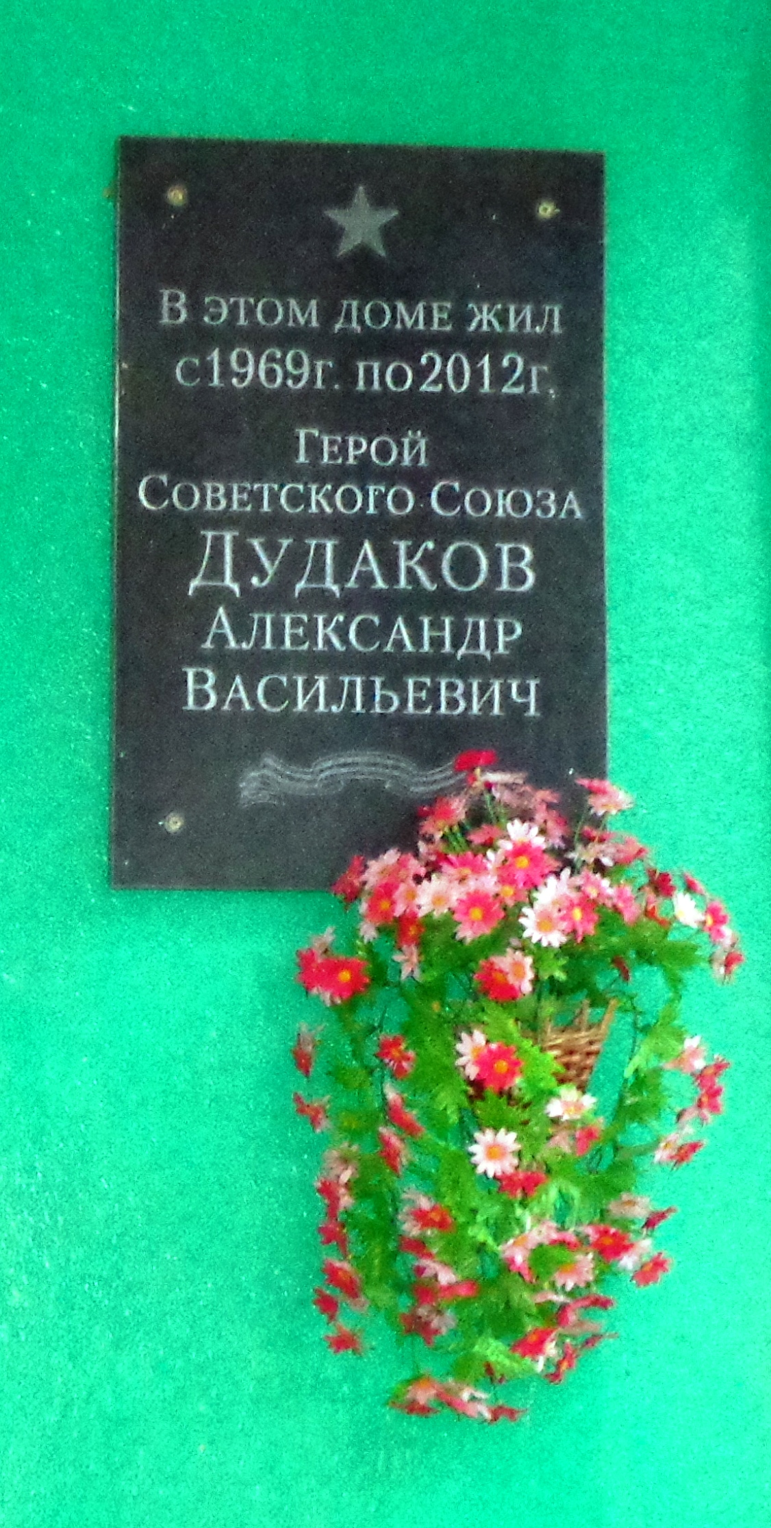 Мемориальная доска Герою Советского Союза А.В. Дудакову